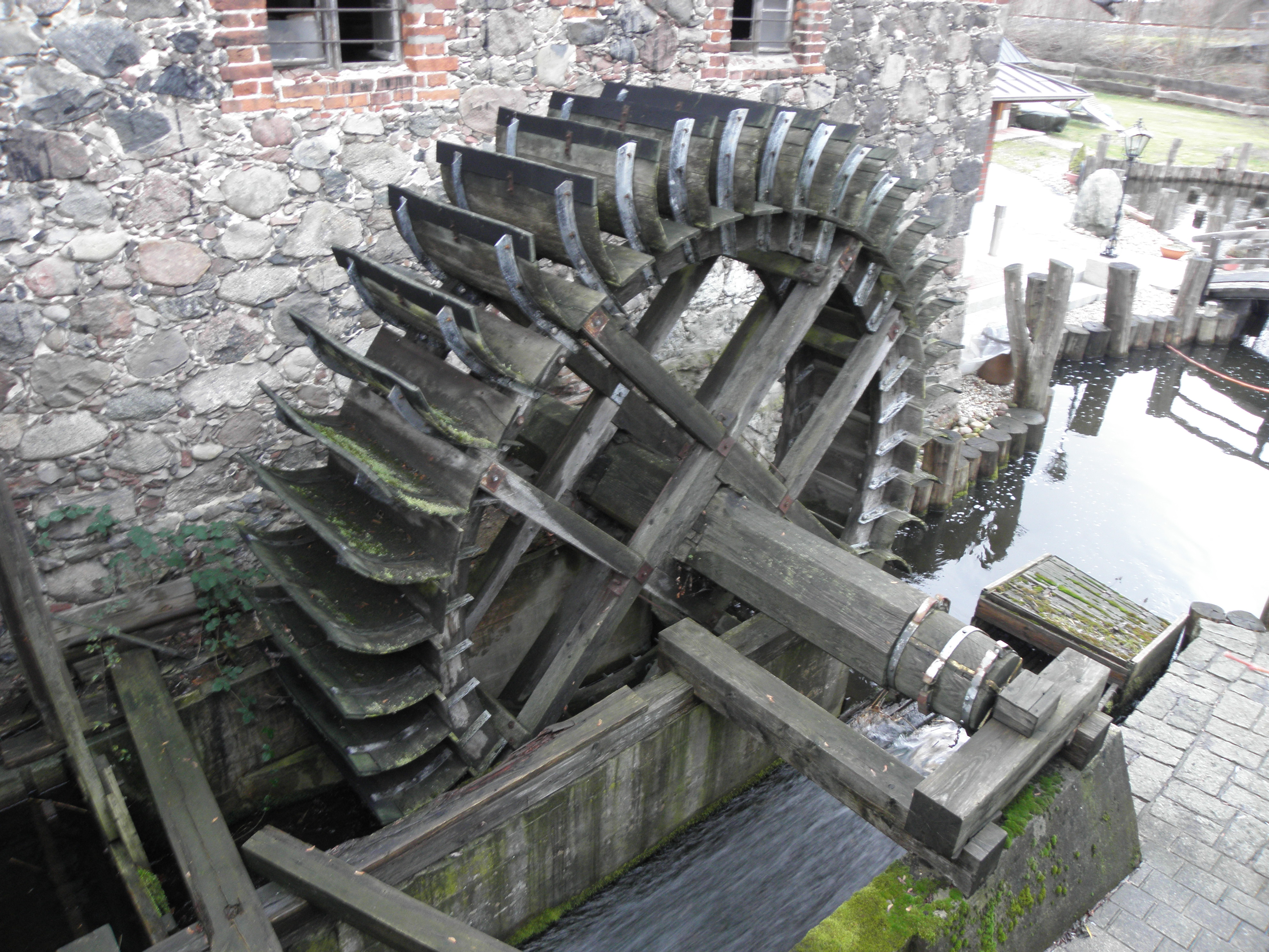 Wassermühle am Kleinen Glubigsee in Wendisch-Rietz, wird erstmals 1641 als Newen molen schriftlich erwähnt; Die Neue Mühle wird dann 1834 durch einen Neubau ersetzt. Das Gehöft besteht aus Stall, Scheune und Wohnhaus mit Mühle, errichtet aus Feldsteinen. Die Mühle hat noch bis 1960 gearbeitet. Durch einen Hausneubau 1992 hat das historische Gesamtensemble am Bedeutung verloren und das Mühlrad ist durch einen dichten Zaun verdeckt.